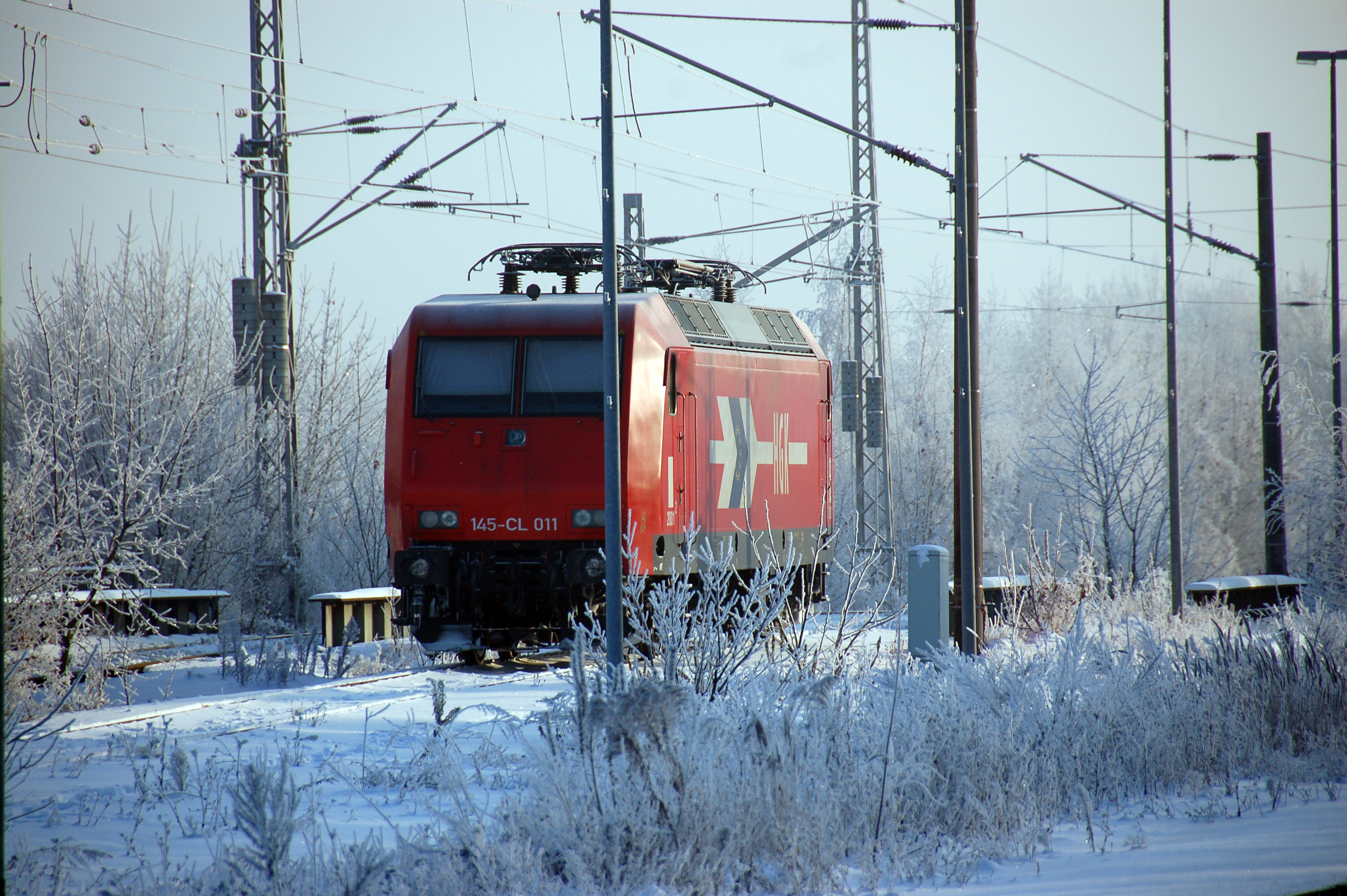 Bahnhof Angermünde